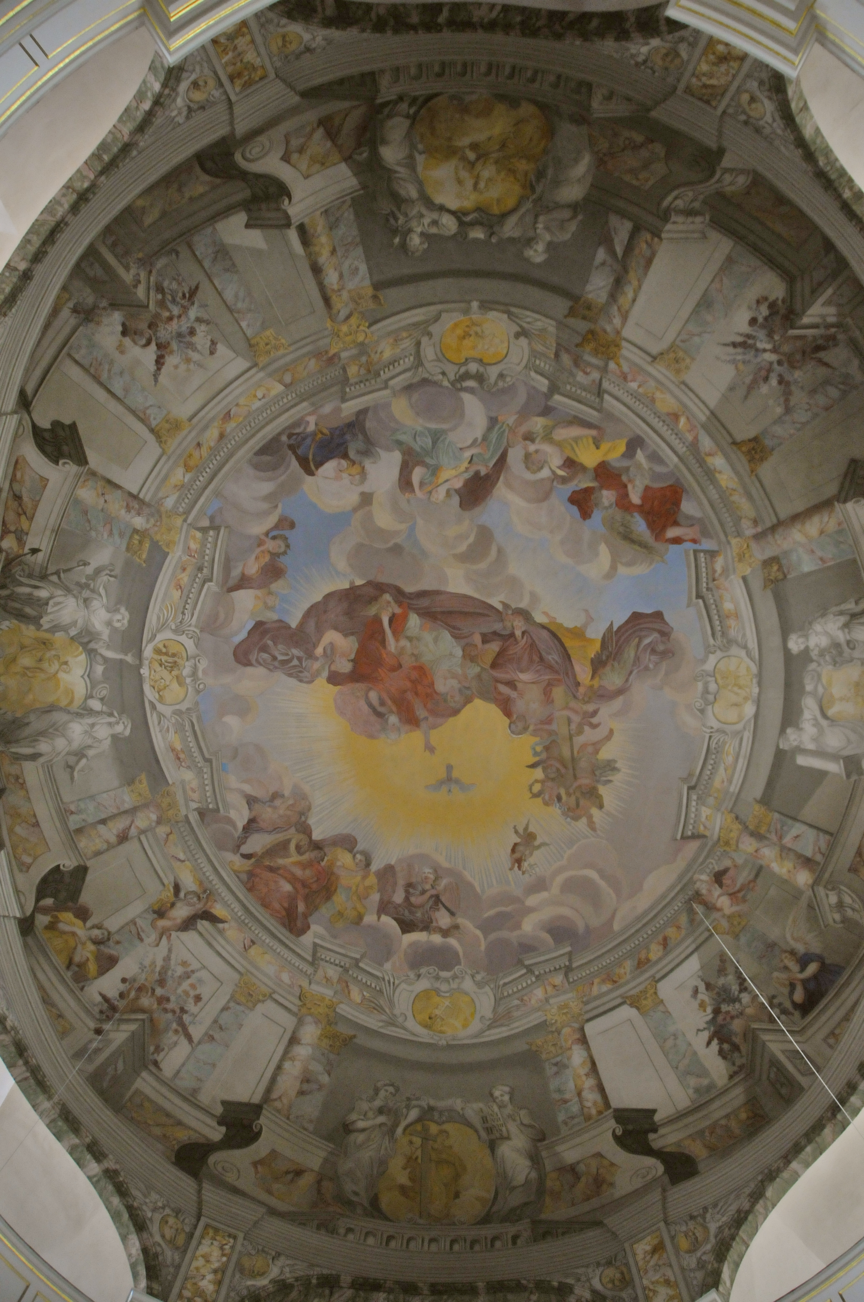 Waltershausen, Stadtkirche, Kirchenhimmel